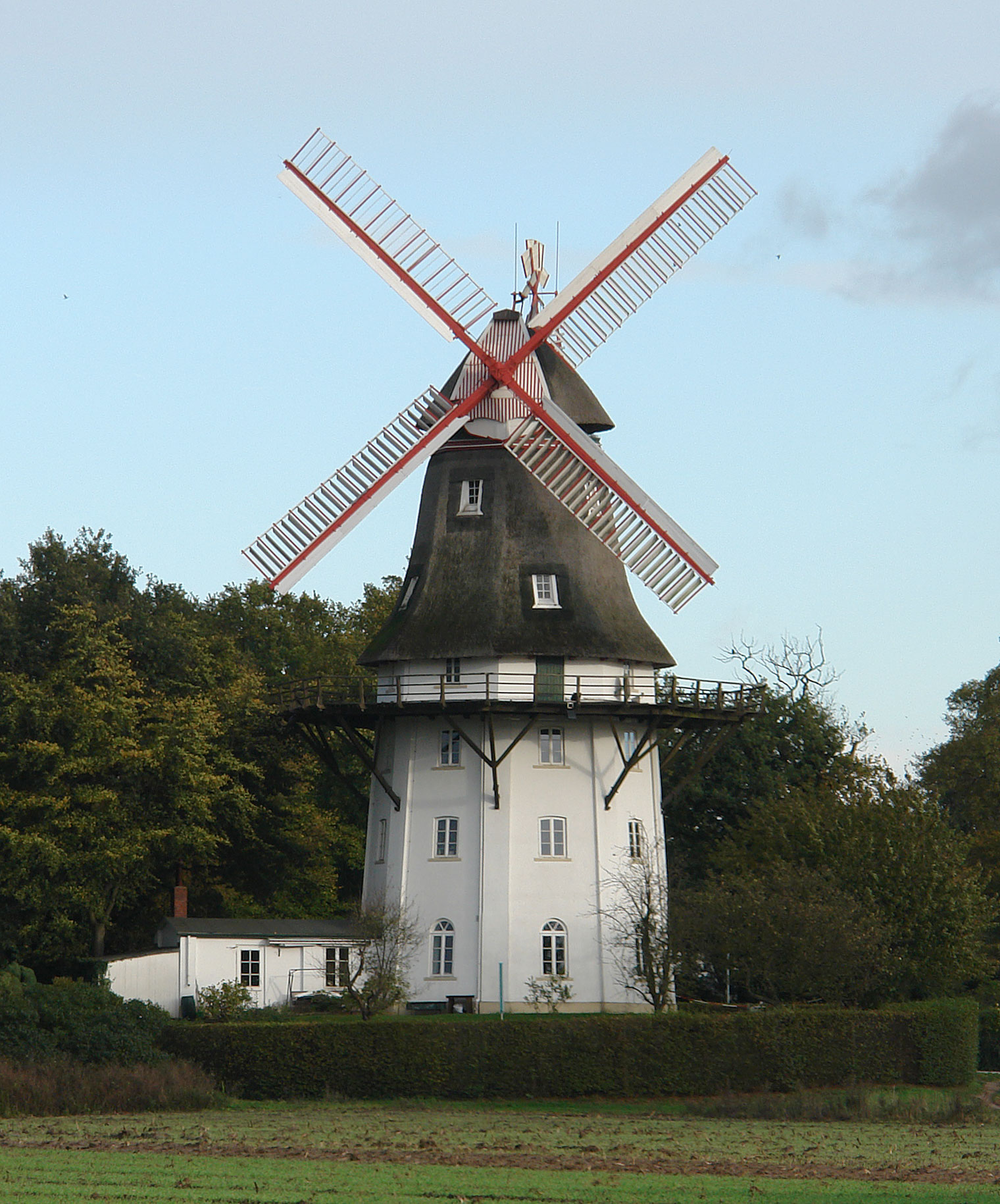 Windmühle von 1848 in Oberneuland (Bremen) Das abgebildete Objekt ist ein geschütztes Kulturdenkmal in der Freien Hansestadt Bremen, mit der Nr. 0933 beim Landesamt für Denkmalpflege registriert.